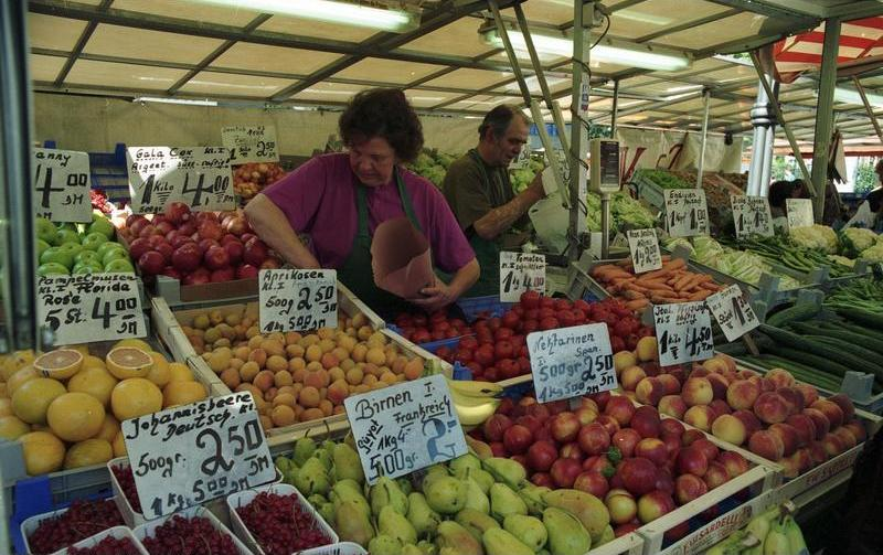 29.7.1991 Szenen in der Bonner Innenstadt (Fußgängerzone) während des Sommer-Schluß-Verkaufs